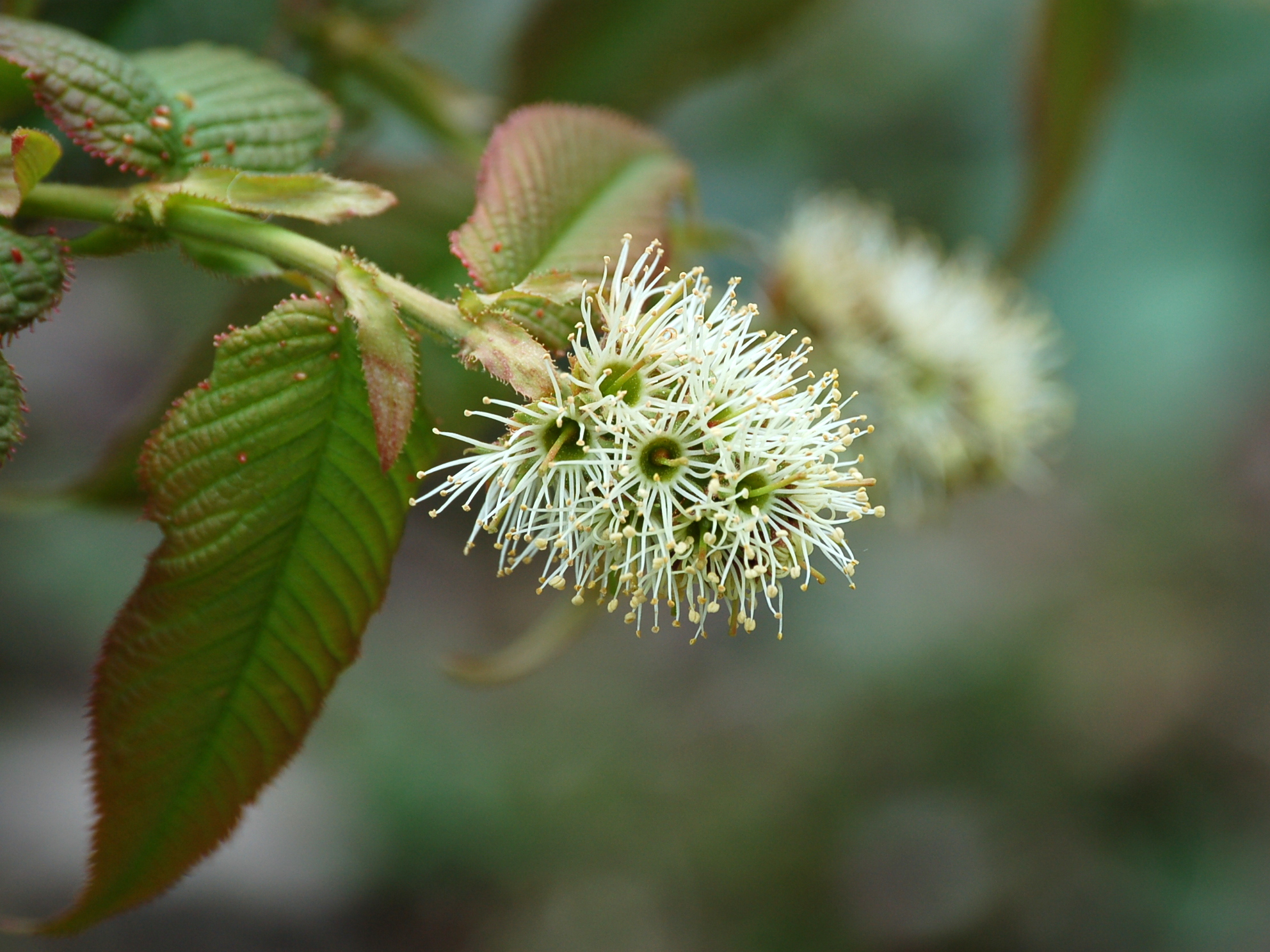 Maddenia himalaica - Inflorescencia - Bután